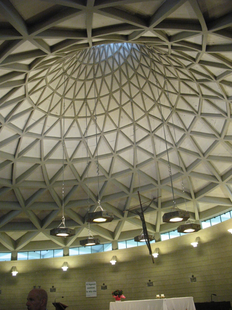 Roberto Brusutti